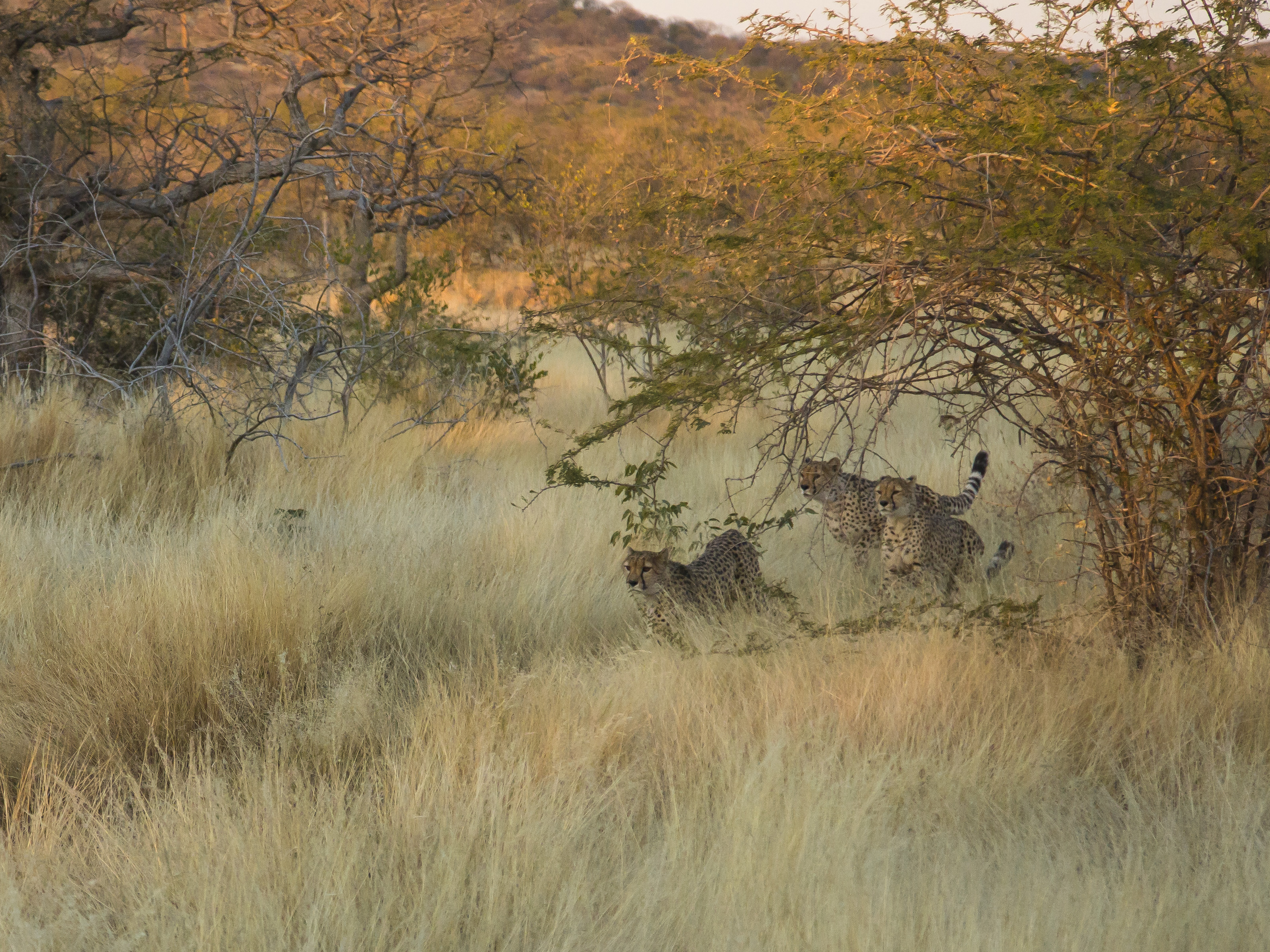 Geparden auf der Jagd eines Oryx in Namibia